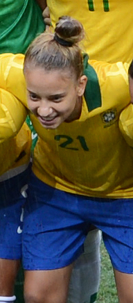 Selecionado feminino do Brasil, campeãs do Torneio Internacional de Brasília - 2013